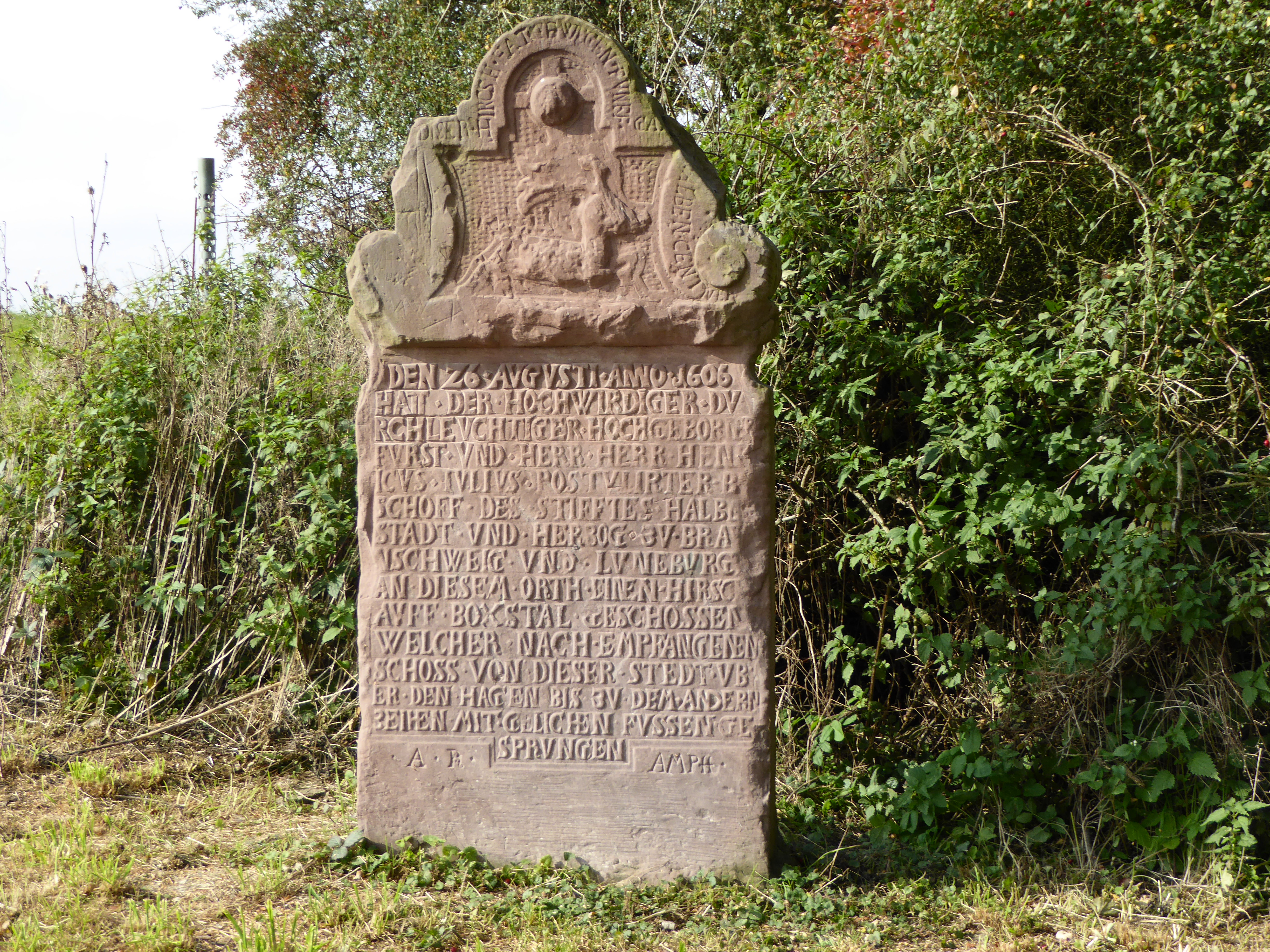 Hirschsprung-Gedenkstein zwischen Greene und Holtershausen